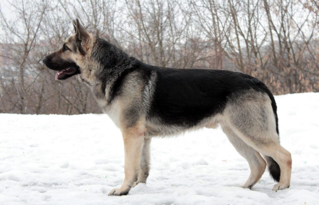 Vostochno Evropeiskaya Ovcharka (VEO) - Osteuropäischer Schäferhund - Präsentation, Illustration, Standard, Köper